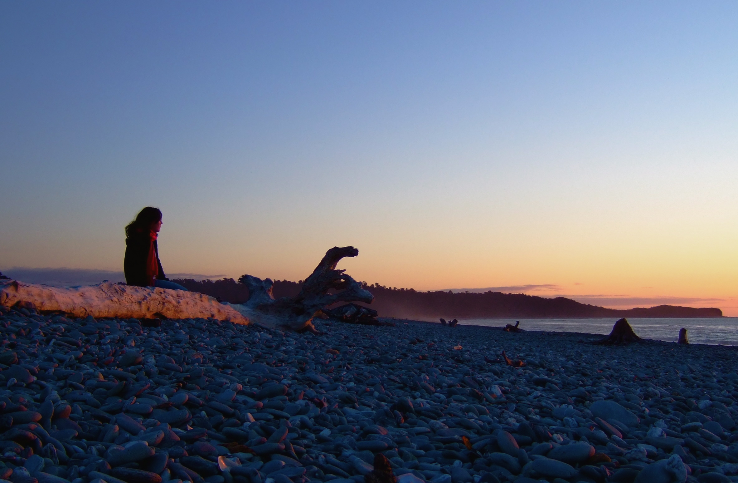 Gillespie's Beach, Westland, New Zealand